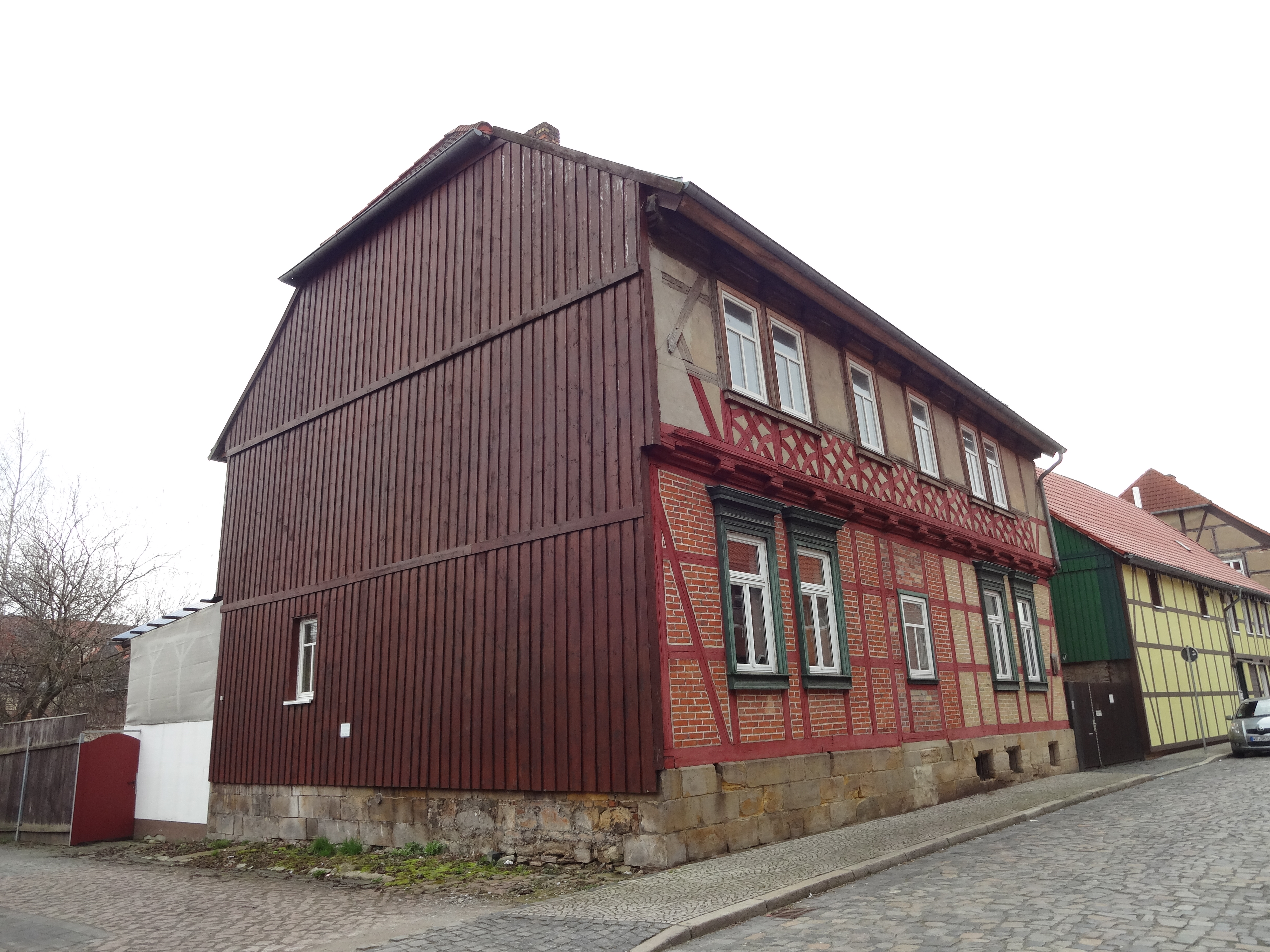 denkmalgeschütztes Fachwerkhaus in der Kirchstraße 4 in Derenburg, Ortsteil von Blankenburg (Harz)